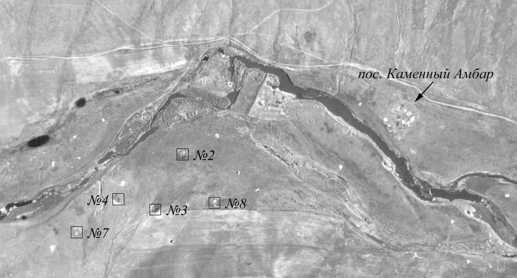 Аэрофотоснимок микрорайона Каменный Амбар. Номерами отмечены курганы могильника Каменный Амбар-5.